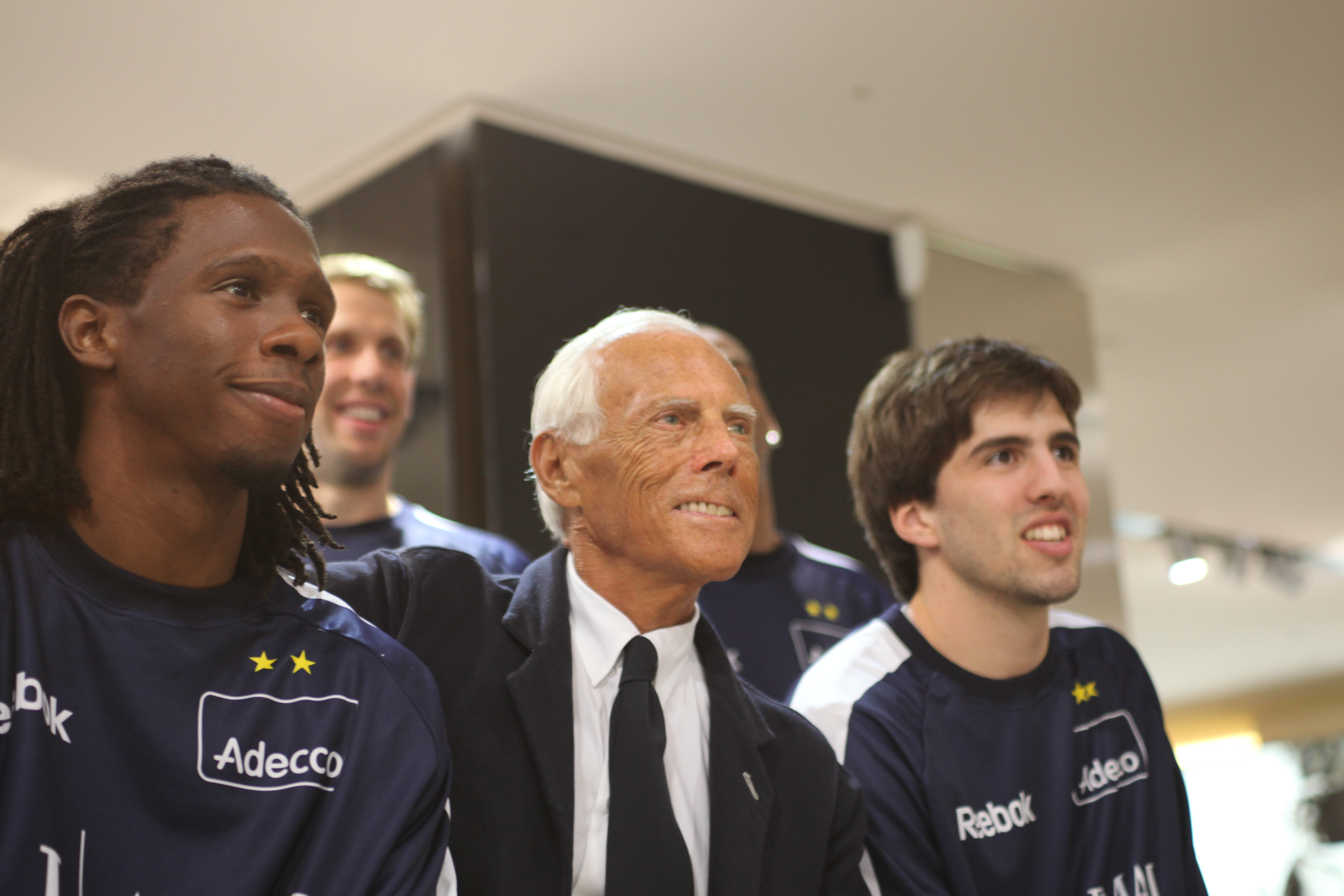 Vogue Fashion's Night Out Sept.10 2009 MILANO. Il patron dell'Olimpia Milano Giorgio Armani insieme ad alcuni giocatori, tra cui l'americano Morris Finley e l'argentino Ariel Filloy.